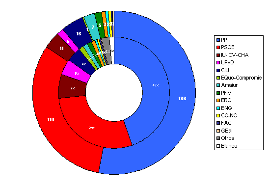 Gráfico que muestra la proporción de votos (corona interior) y escaños (corona exterior) en las Elecciones Generales de España 2011 al Congreso.